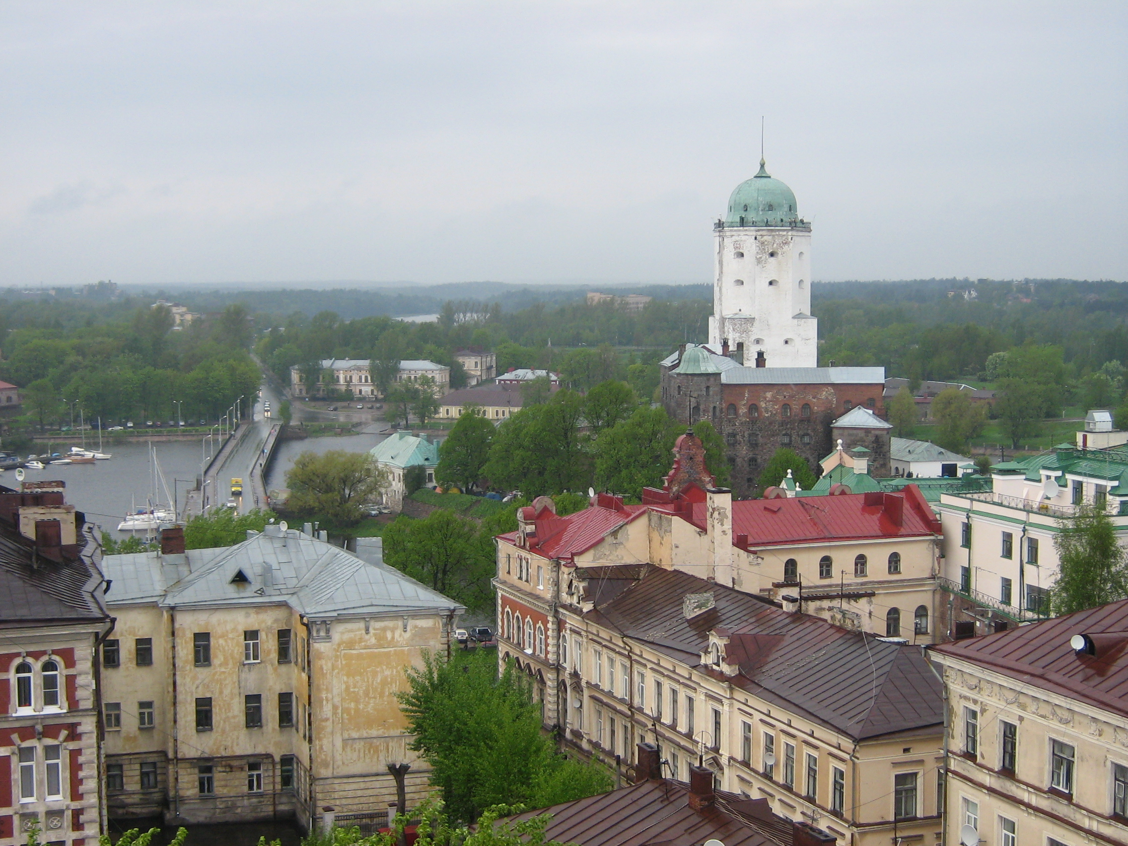 Vyborg